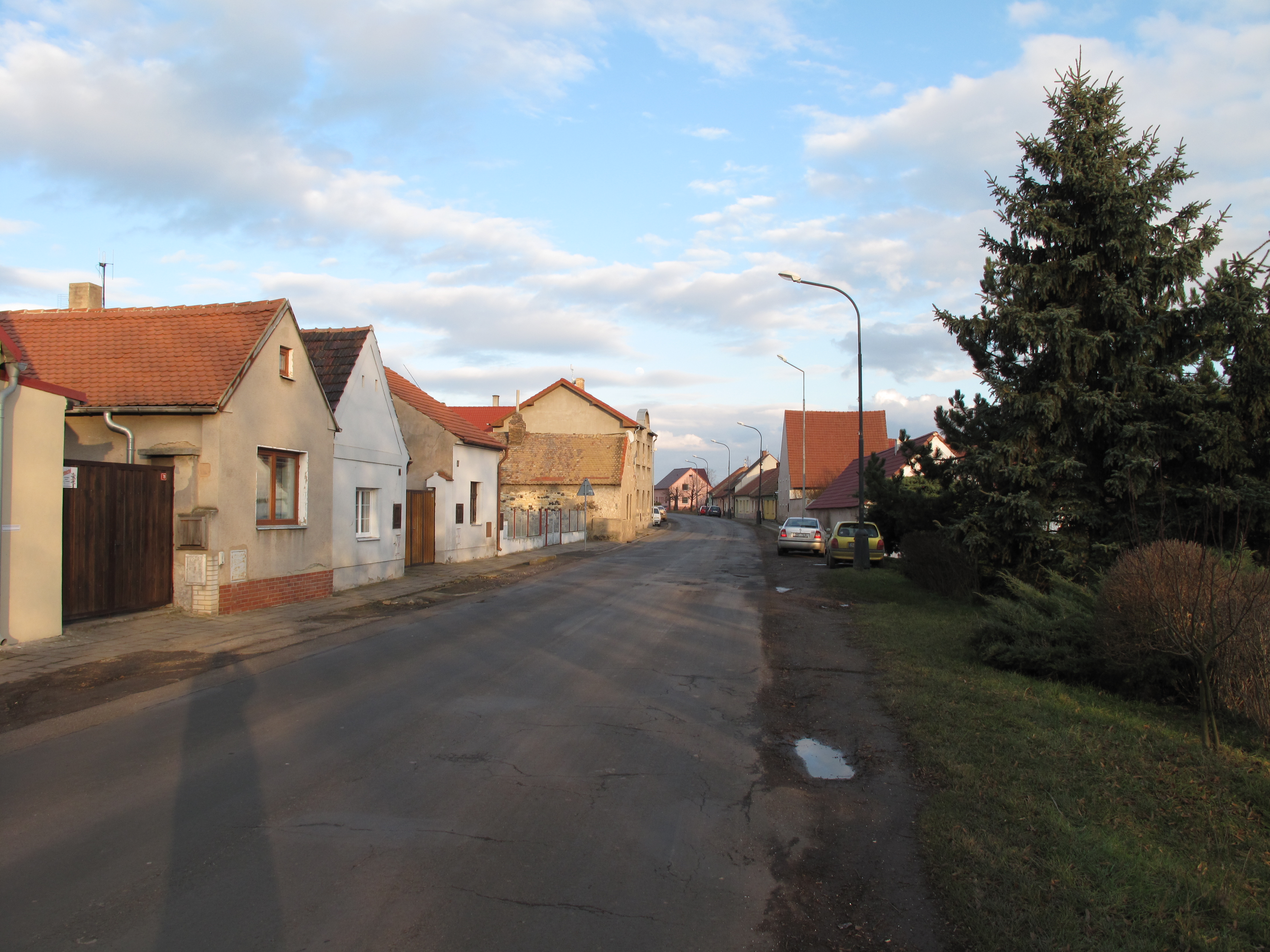 Silnice v Dubanech. Okres Litoměřice, Česká republika.